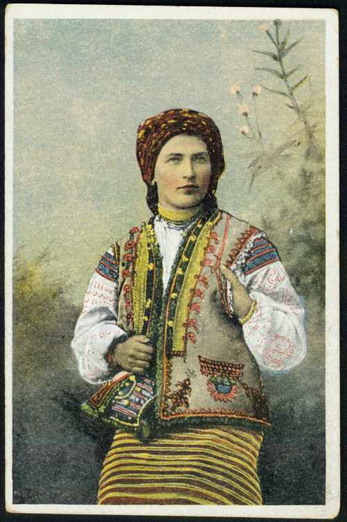 Гуцули: Гуцули